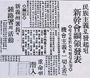 한국의 독립운동 단체 신간회 창립을 보도하는 〈동아일보〉 기사